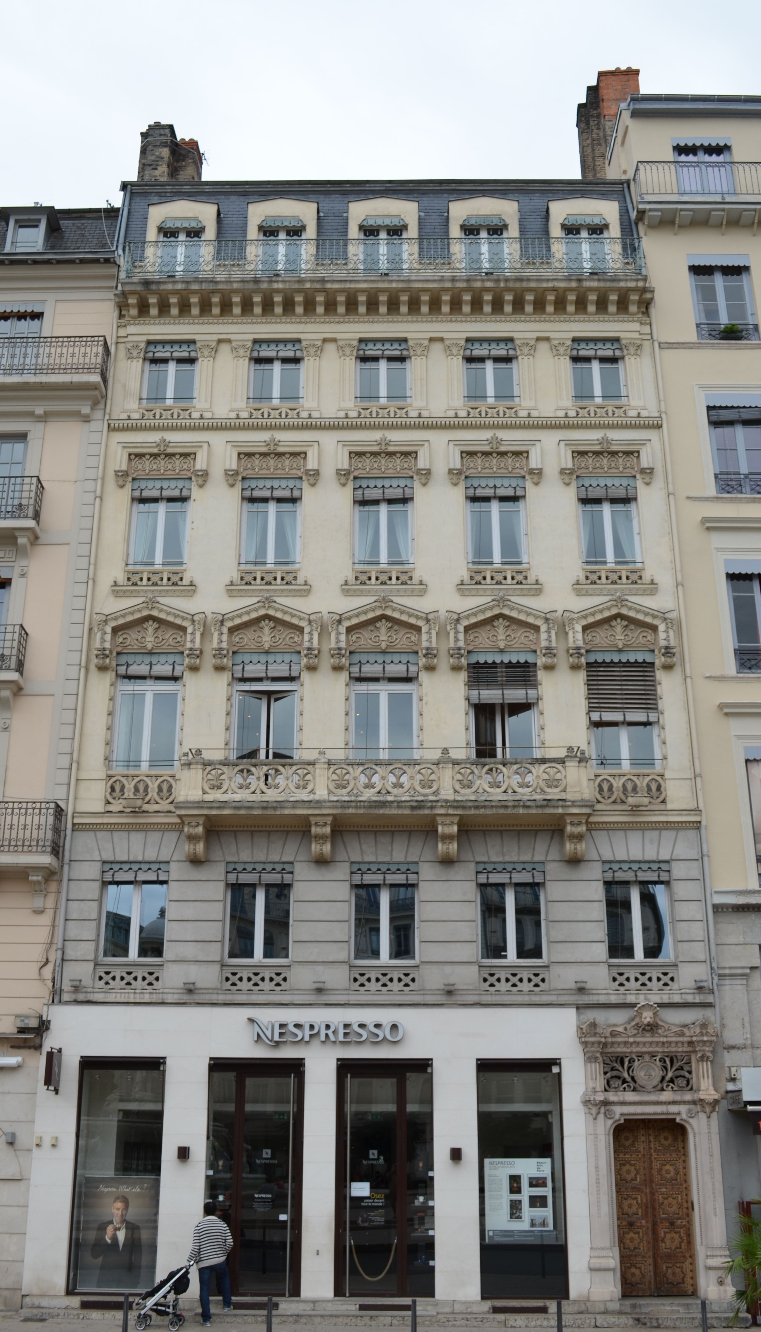 Immeuble au 4, place des Jacobins (Lyon, France). Architecte : Pierre Bossan pour le peintre Paul Borel